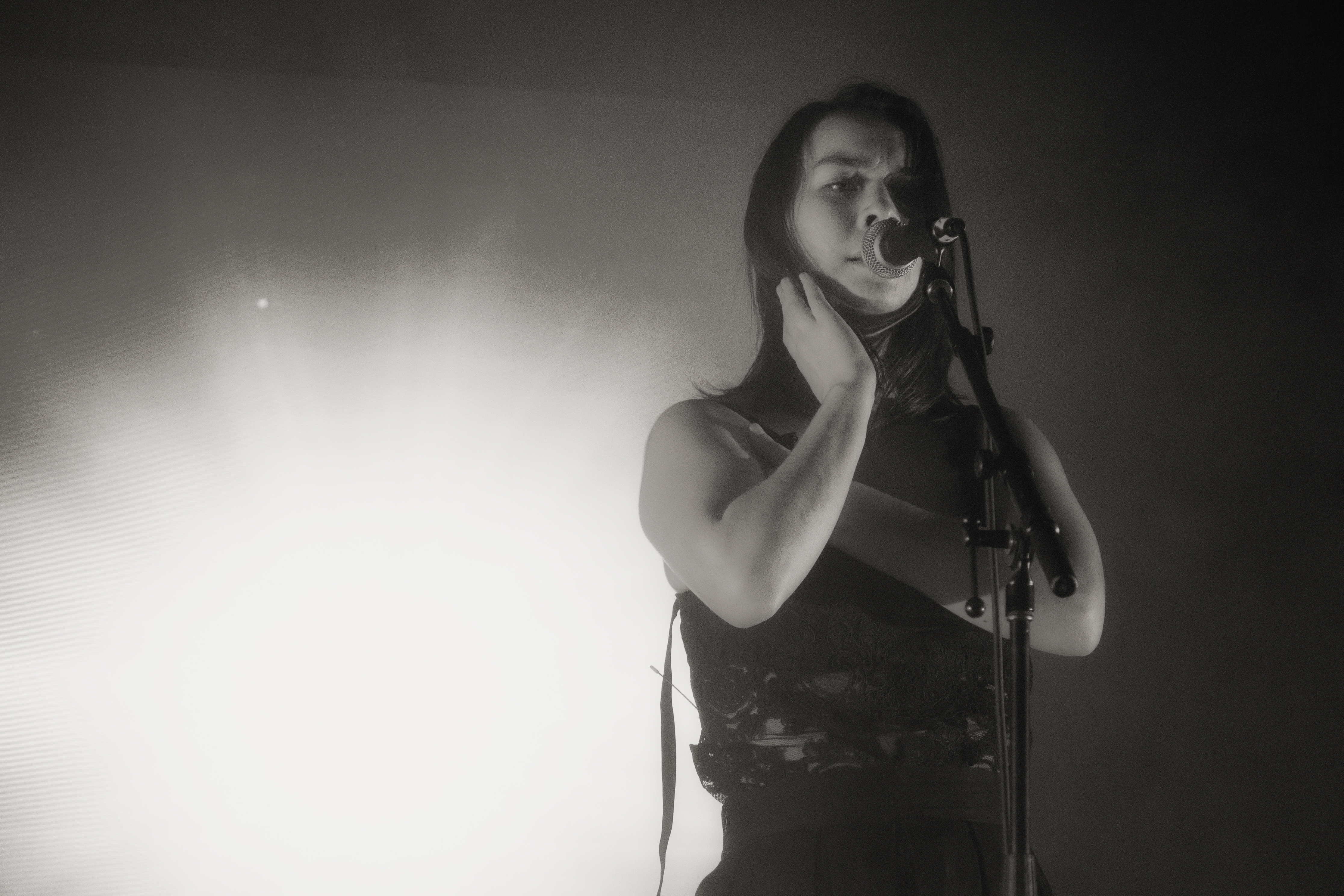 Mitski